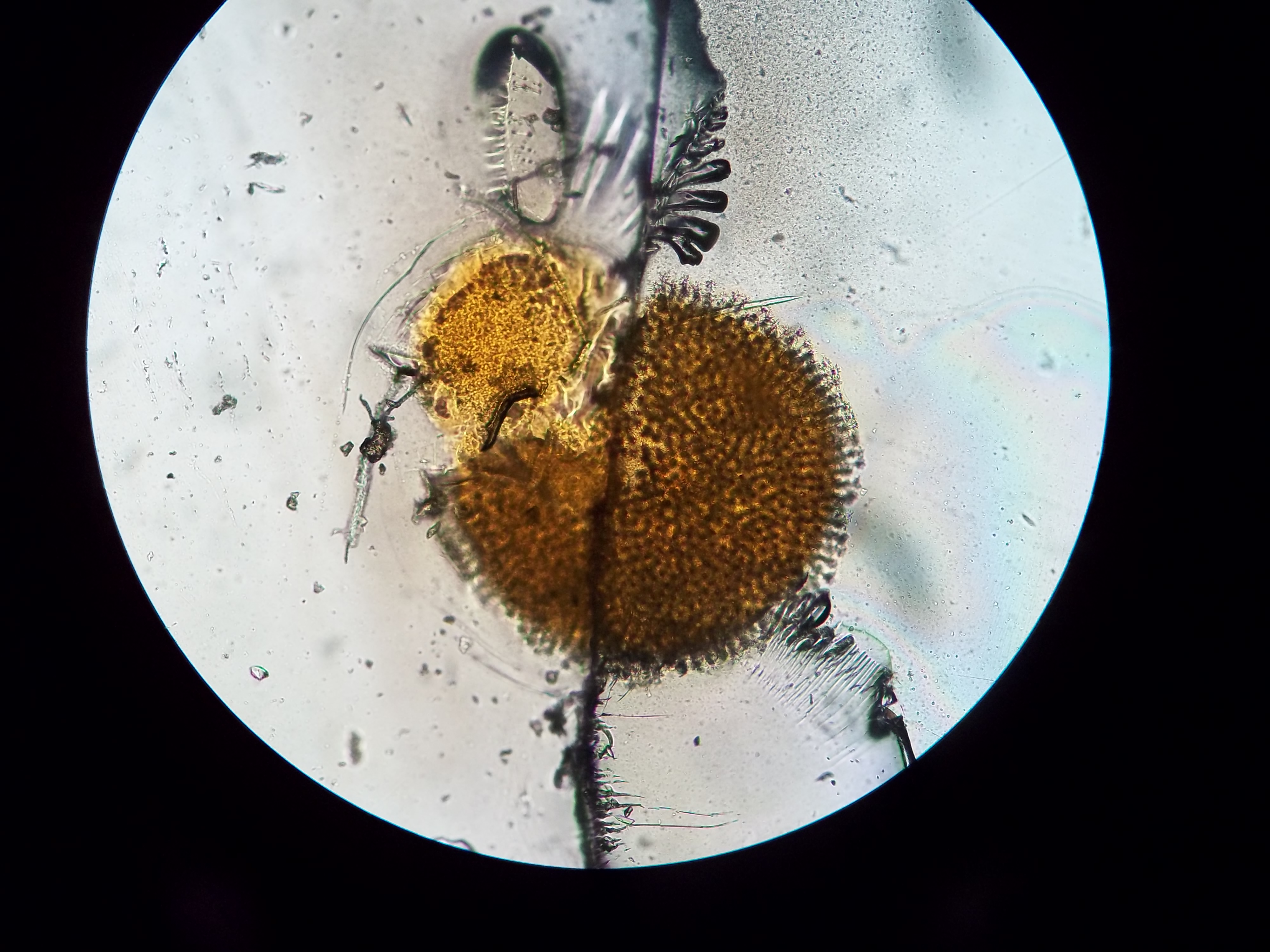 Gémula de esponja. Microscopía óptica, 40X. La banda negra central y los detalles por encima y debajo son roturas en el cubreobjetos del preparado.